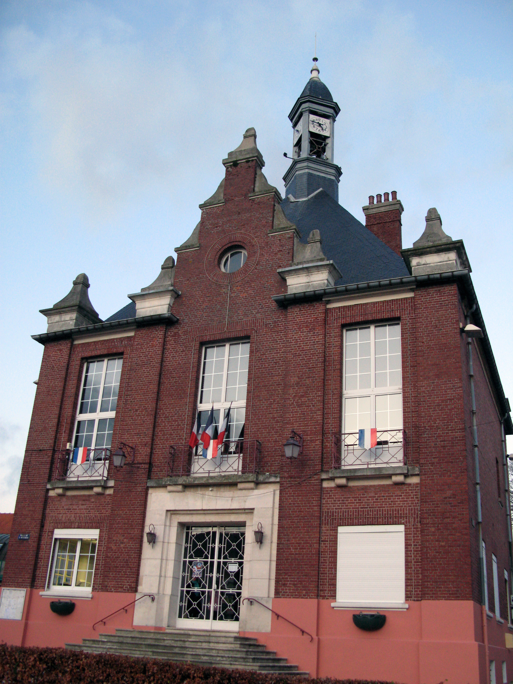 Roisel (Somme, France) - L'hôtel-de-ville. .